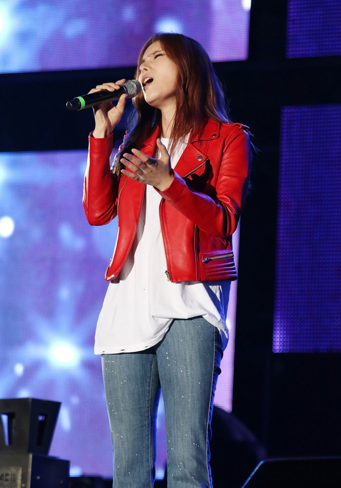 160527 입실렌티 거미